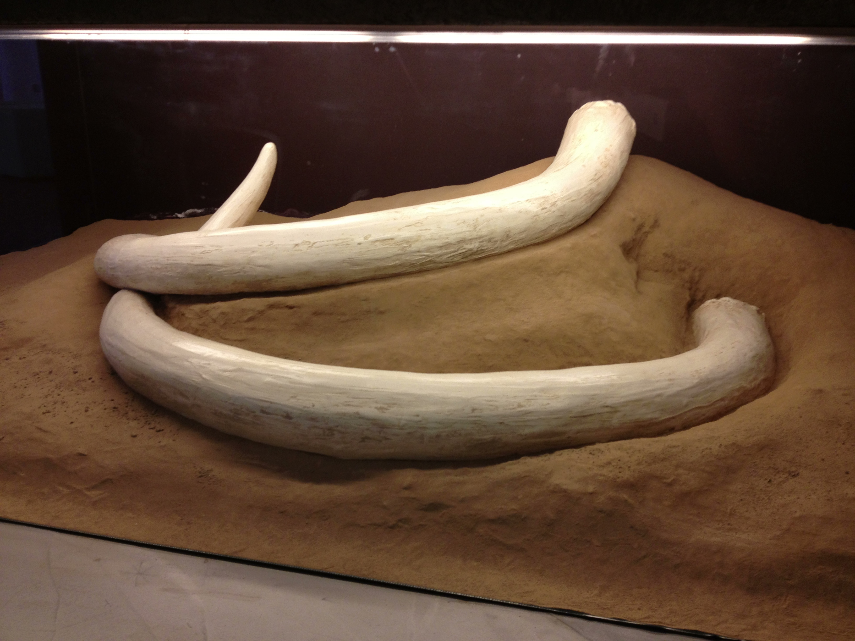 Replika mamutích klů